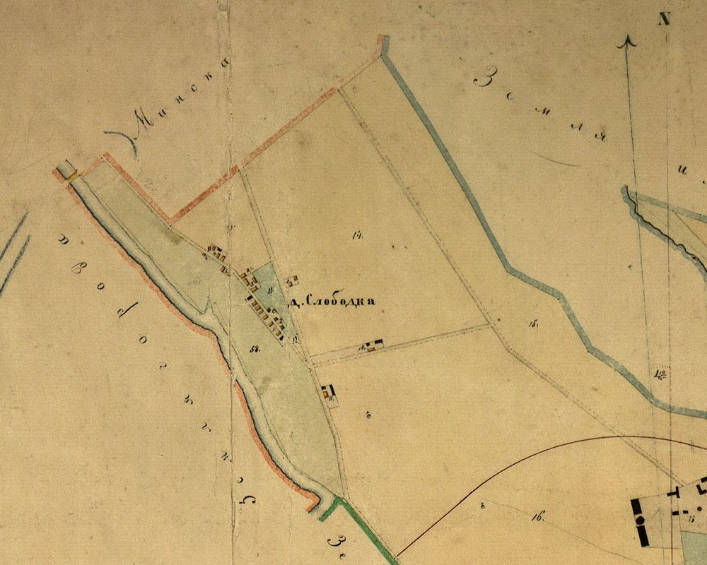 Менск, Архірэйская Слабодка. План